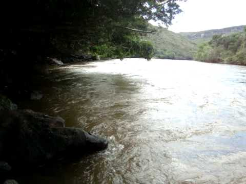 lugar turistico